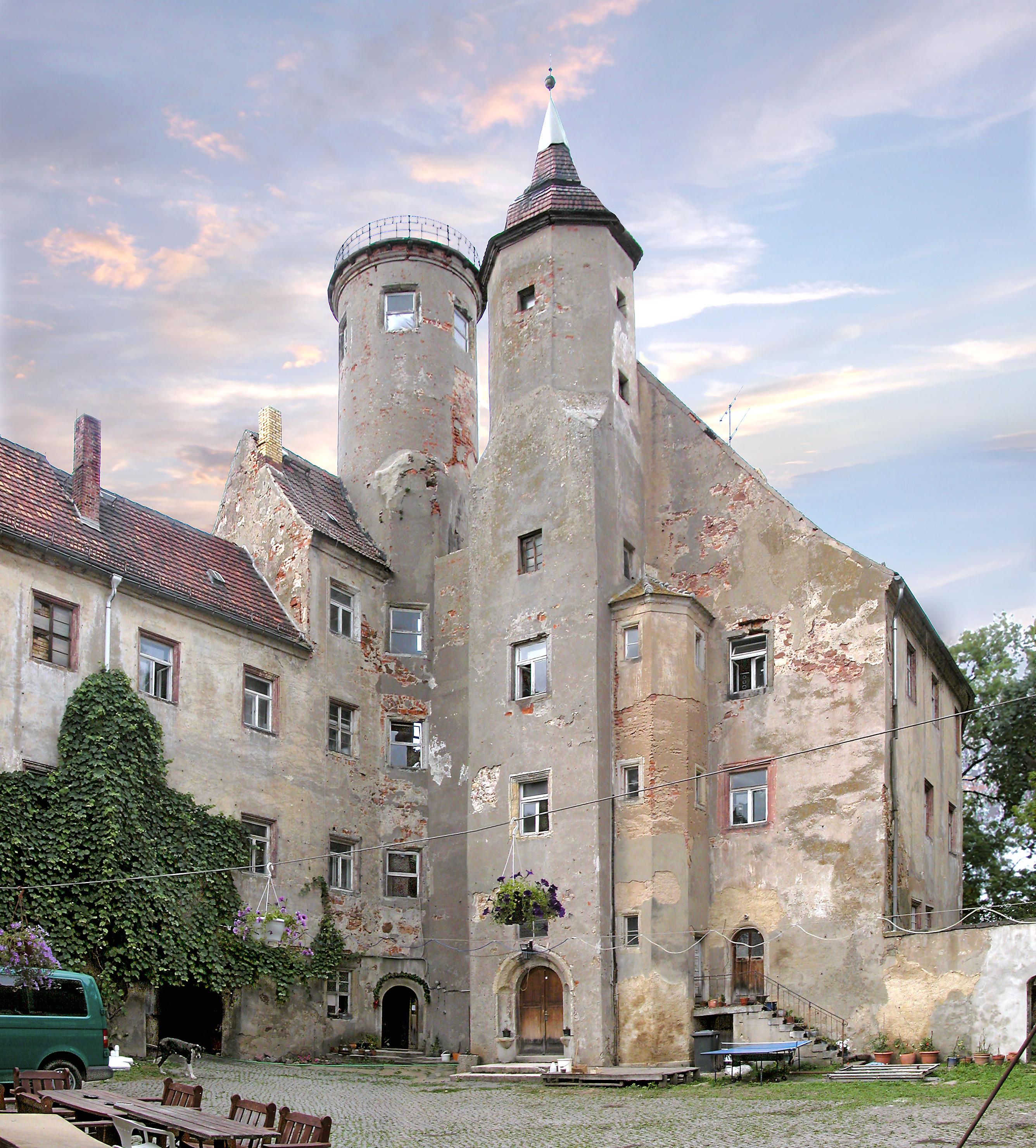 08.08.2006 04749 Noschkowitz (Ostrau): Schloß, ehem. Wasserburg (15.-17. Jh.). Links das Torhaus (Nordflügel), rechts die Westfassade des Ostflügels (ältester Teil der Schloßanlage). [DSCN11017-11020.JPG]20060808400MDR.JPG(c)Blobelt